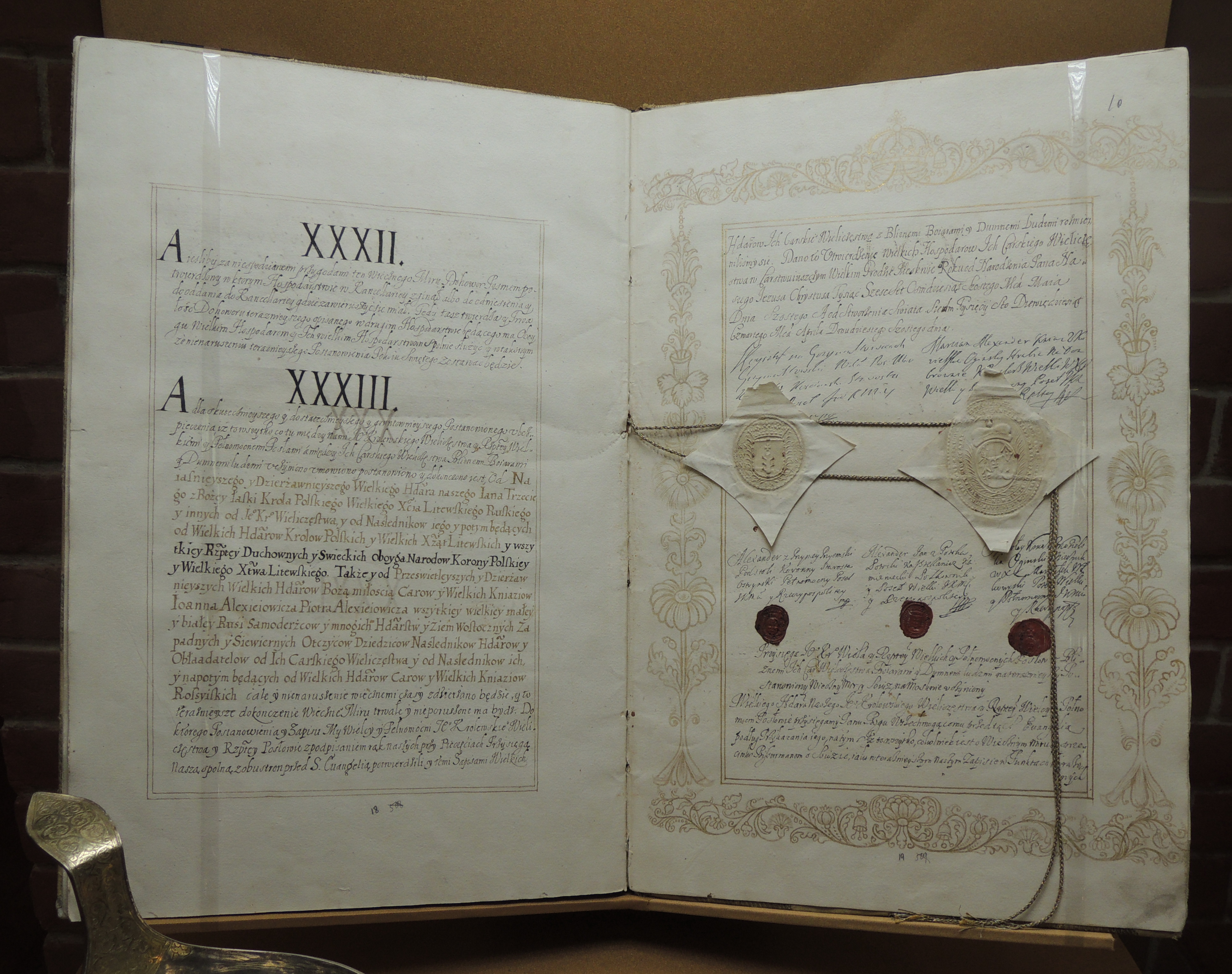 Русский экземпляр договора России и Речи посполитой о Вечном мире, 1686. АНПРИ Выставка "Романовы. Начало династии", приуроченная к 400-летию избрания на царство Михаила Федоровича Государственный Исторический музей, весна 2013 года